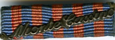 Baretka Krzyża Pamiątkowego Monte Cassino